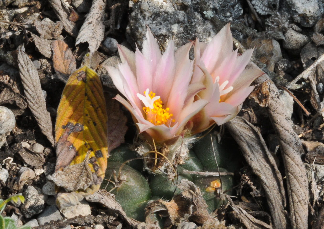 Turbinicarpus laui aus der Nähe von Cerritos im mexikanischen Bundesstaat San Luis Potosi.